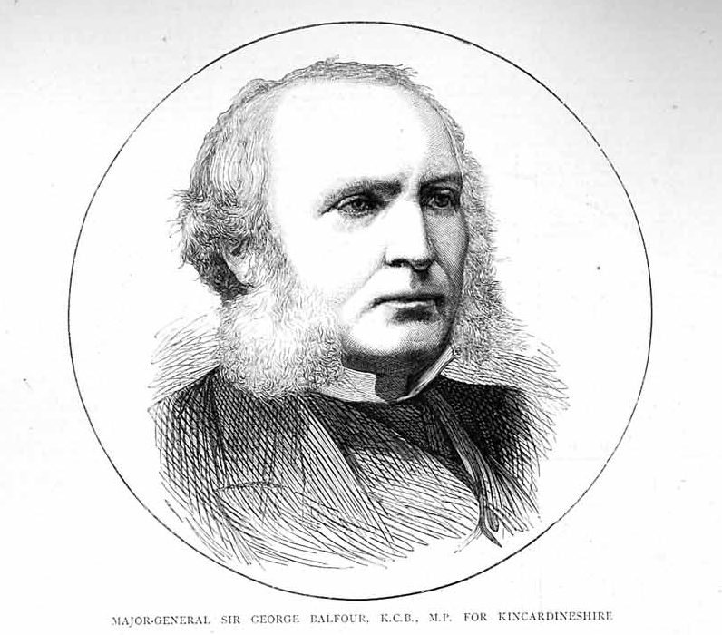 英国驻上海领事，乔治·巴富尔爵士